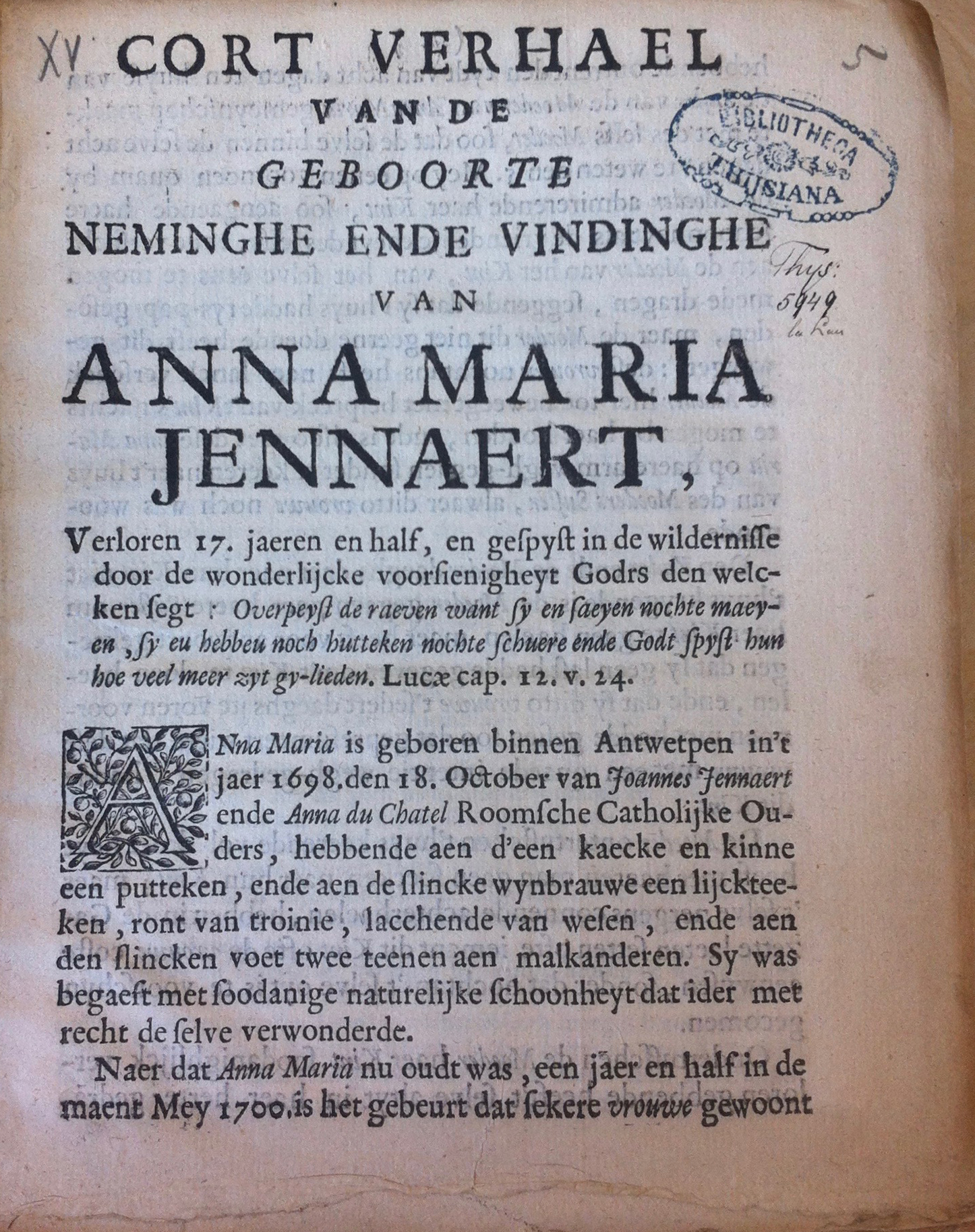 Titelblad van "Cort verhael van de geboorte neminghe ende vindinghe van Anna Maria Jennaert"